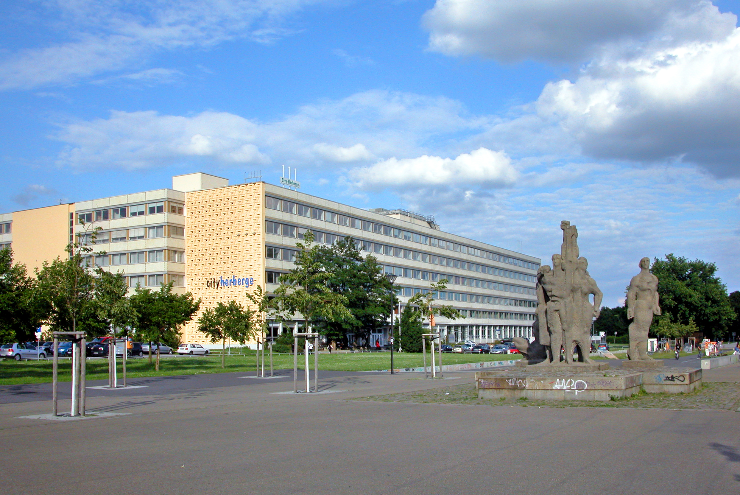 20.06.2009 01069 Dresden: ROBOTRON-Bürohaus Lingnerallee 3 (GMP: 51.047020,13.746661), heute City-Herberge. Erbaut ab 1970 als nördlicher Teil des ROBOTRON-Komplexes. Im Vordergrund die Beton-Skulptur "Proletarischer Internationlismus" auf der Lingnerallee (GMP: 51.046726,13.744457), geschaffen vom Bildhauer Vinzenz Wanitschke 1979-1982. [DSCN37977.TIF]20090620020DR.JPG(c)Blobelt